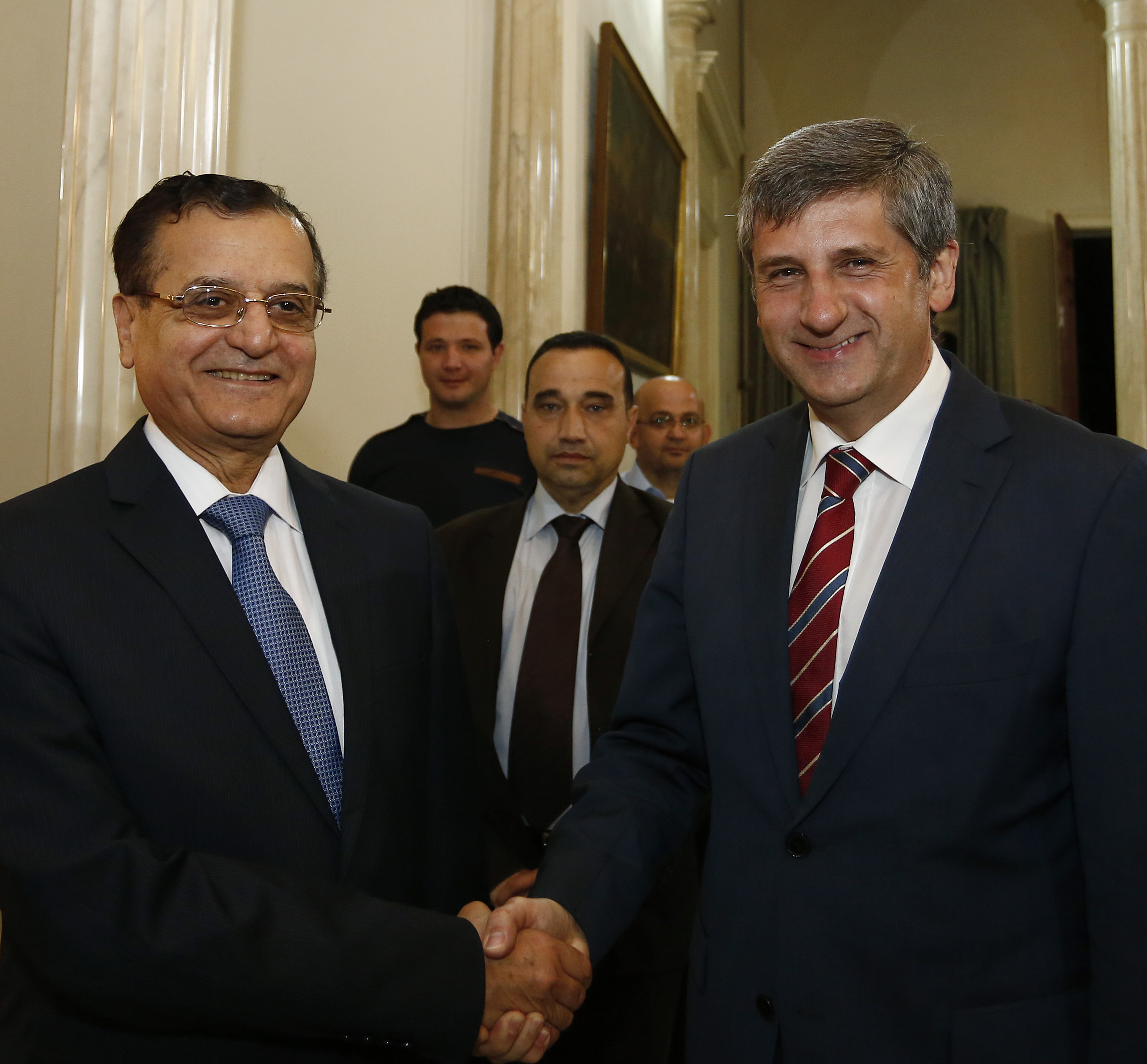 Arbeitsbesuch Libanon, Vizekanzler Michael Spindelegger trifft im Rahmen seiner Nahost-Reise den libanesischen Aussenminister Adnan Mansour in Beirut. 12.04.2013, Foto: Dragan Tatic